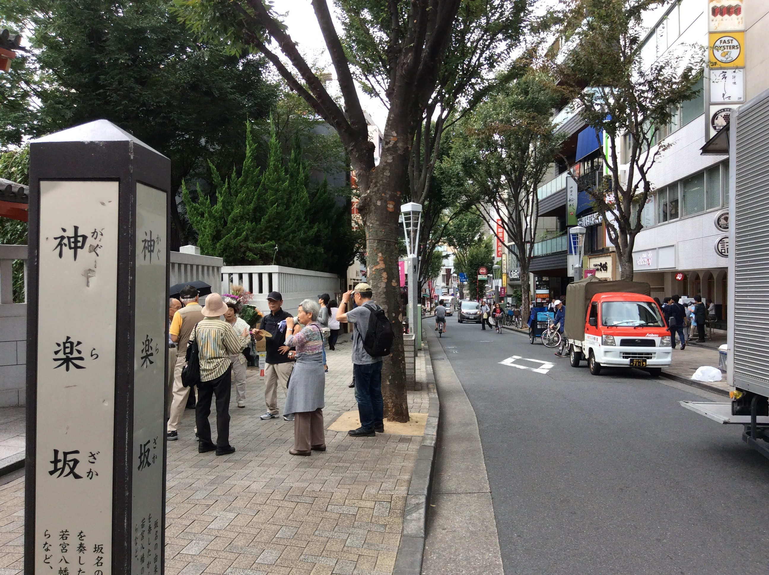 新宿区 神楽坂